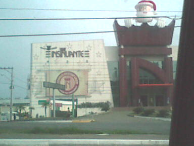 Foto da Loja Insinuante na Paralela, Doron, Salvador, Bahia, Brasil.